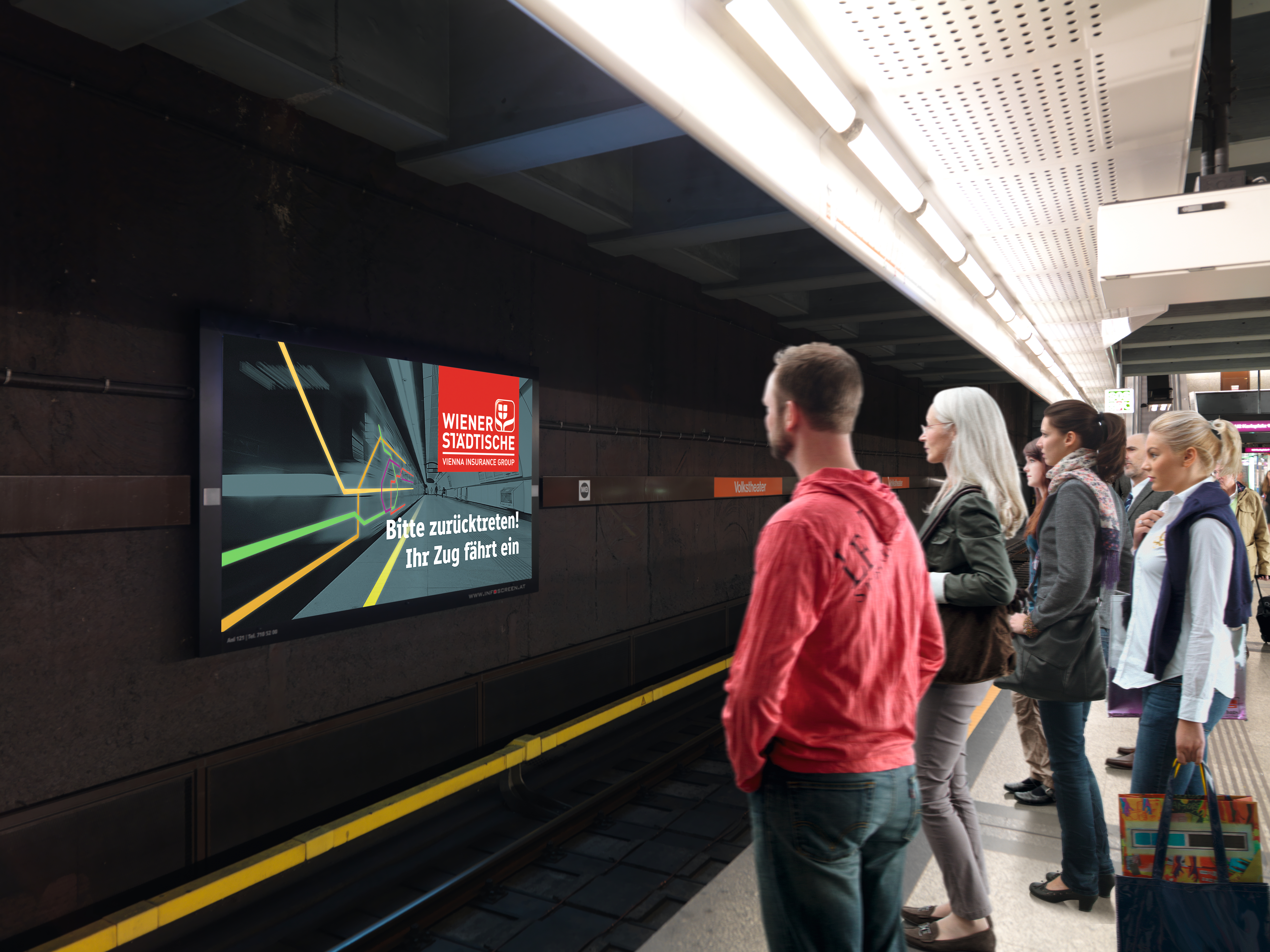 Infoscreen Station